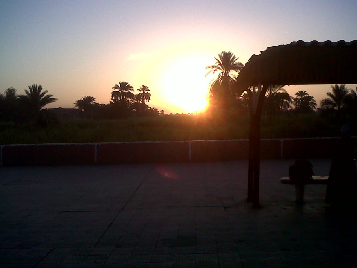 الشروق في دراو وسط المزارع